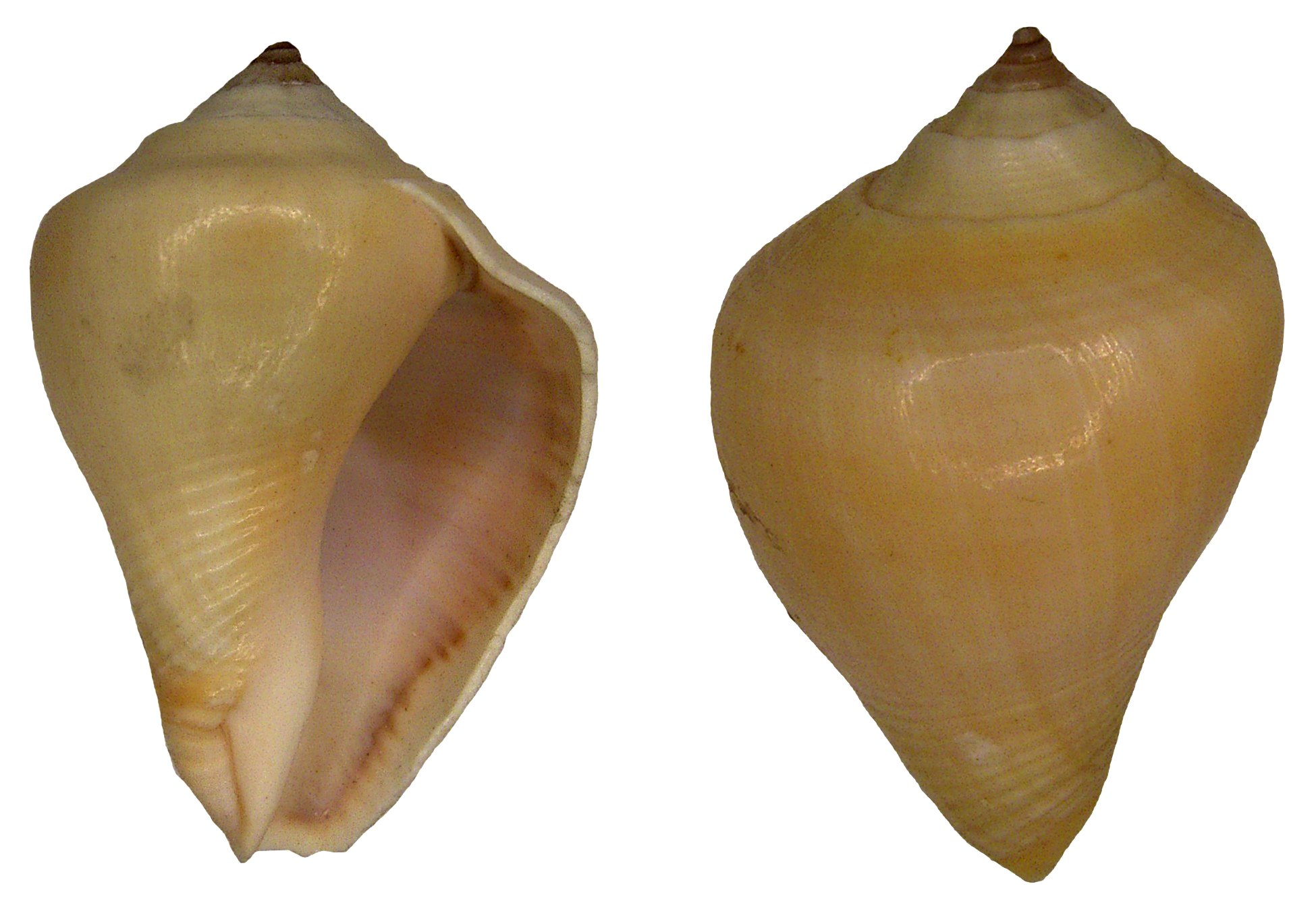 Familie: Melongenidae Groesse: 50 mm Verbreitung: Indischer Ozean Fundort: Mozambique Photo: U.Schmidt, 2008